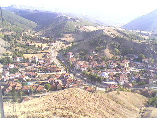 Aydıncık, Yozgat in Turkey.